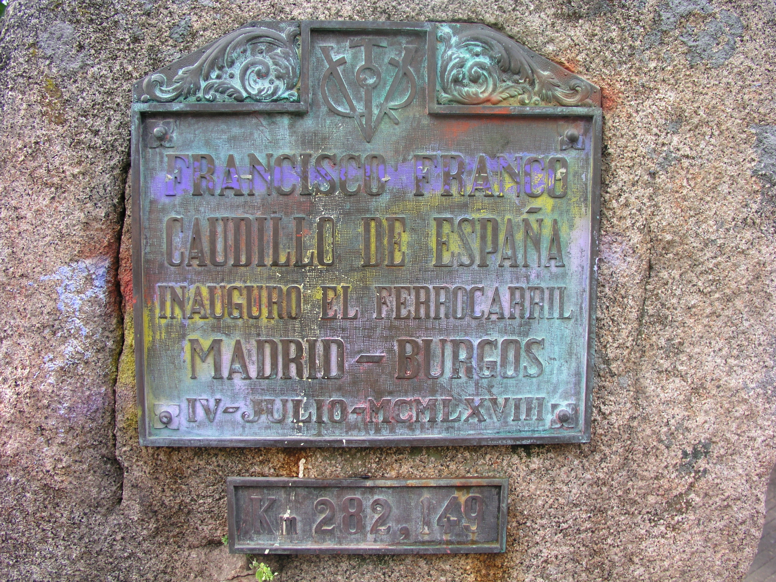 Placa conmemorativa con el emblema «Víctor» de Francisco Franco. Imagen tomada en Burgos, España, año 2006. Francisco Franco Caudillo de España inauguró el ferrocarril Madrid-Burgos IV–Julio–MCMLXVIII Km 282,149